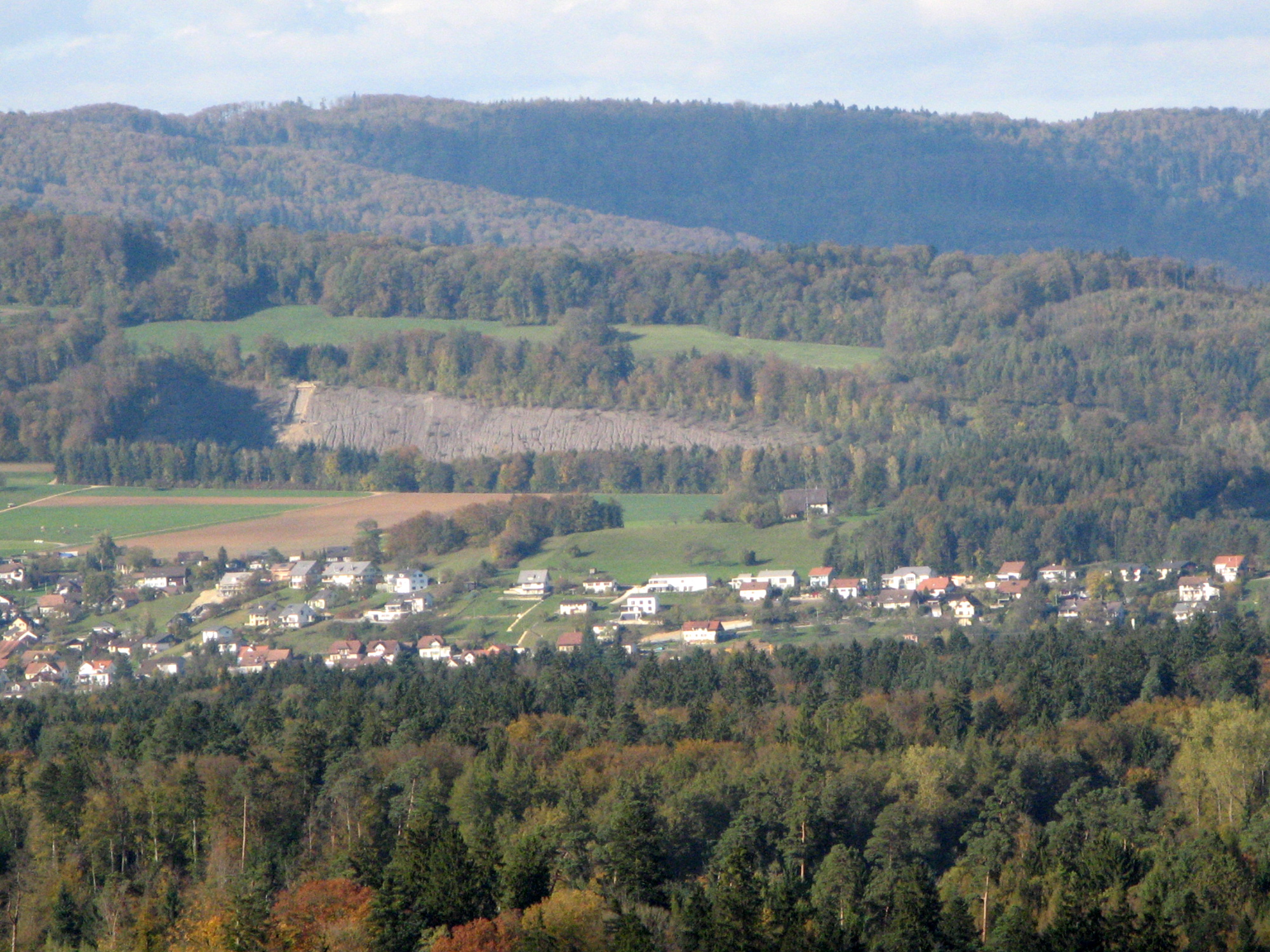 Ansicht von Auenstein, auf dem Staufberg aufgenommen